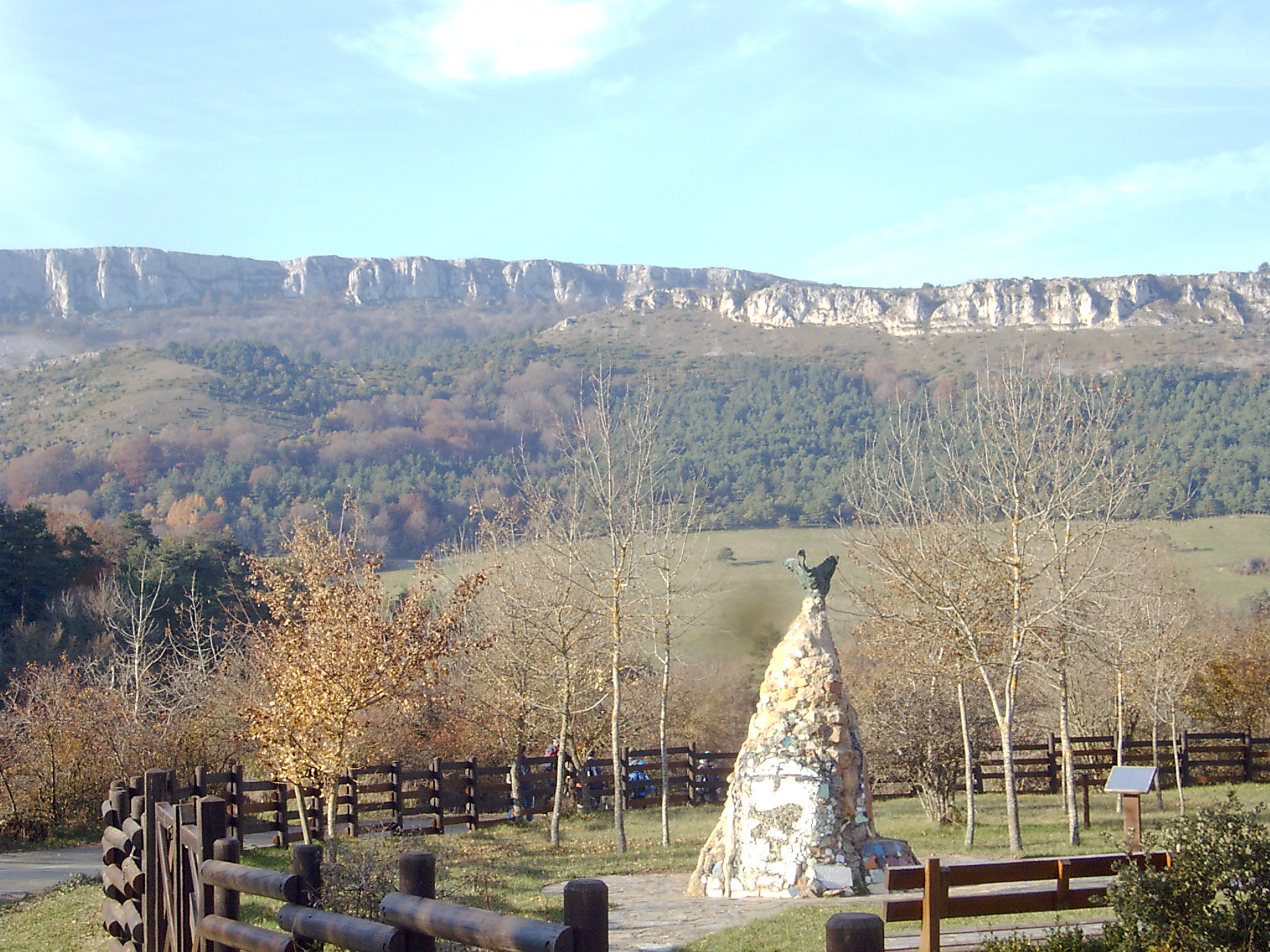 Valderejo natur parkeko baseliza